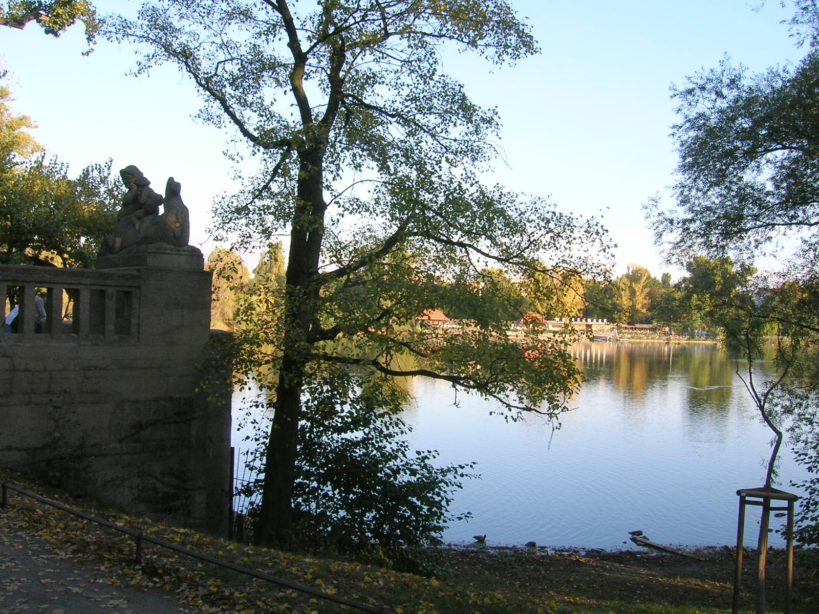 Der Weiße See in Berlin, links die Aussichtsterrasse mit Figurengruppe